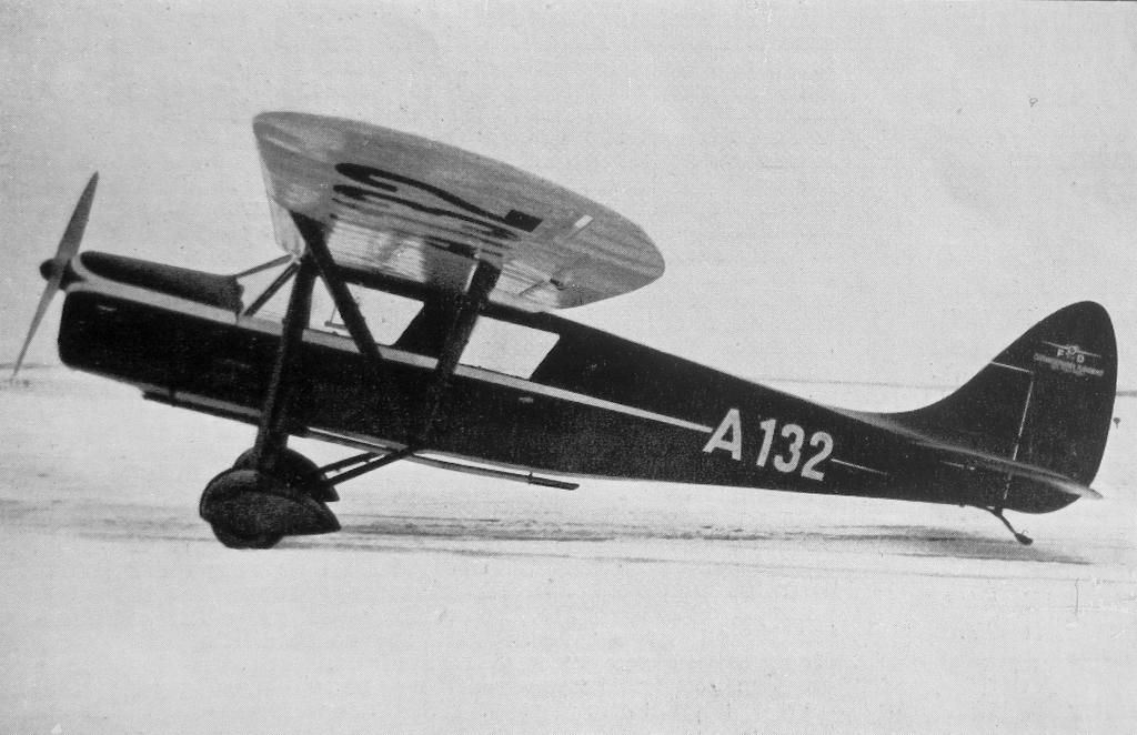 letecký motor Walter Junior 4 a letoun Hopfner HS-10/33